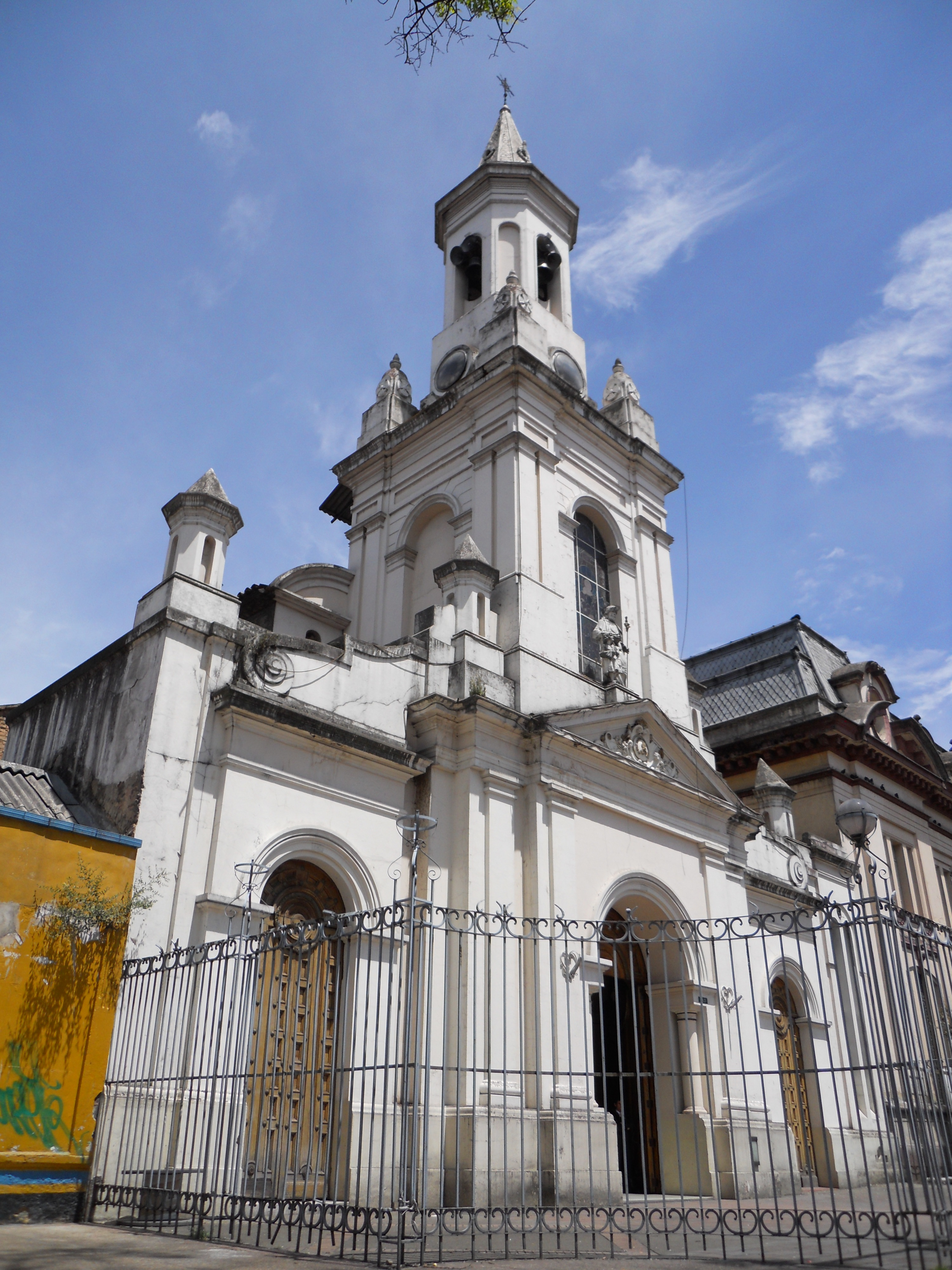 Centro de Bogotá fachada y torre de la iglesia de la capuchina. Calle 14 con carrera 13. Localidad de Santa Fe barrio La Capuchina.